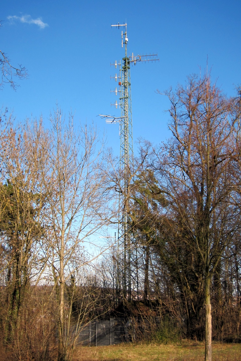 SWR-Sender Giengen